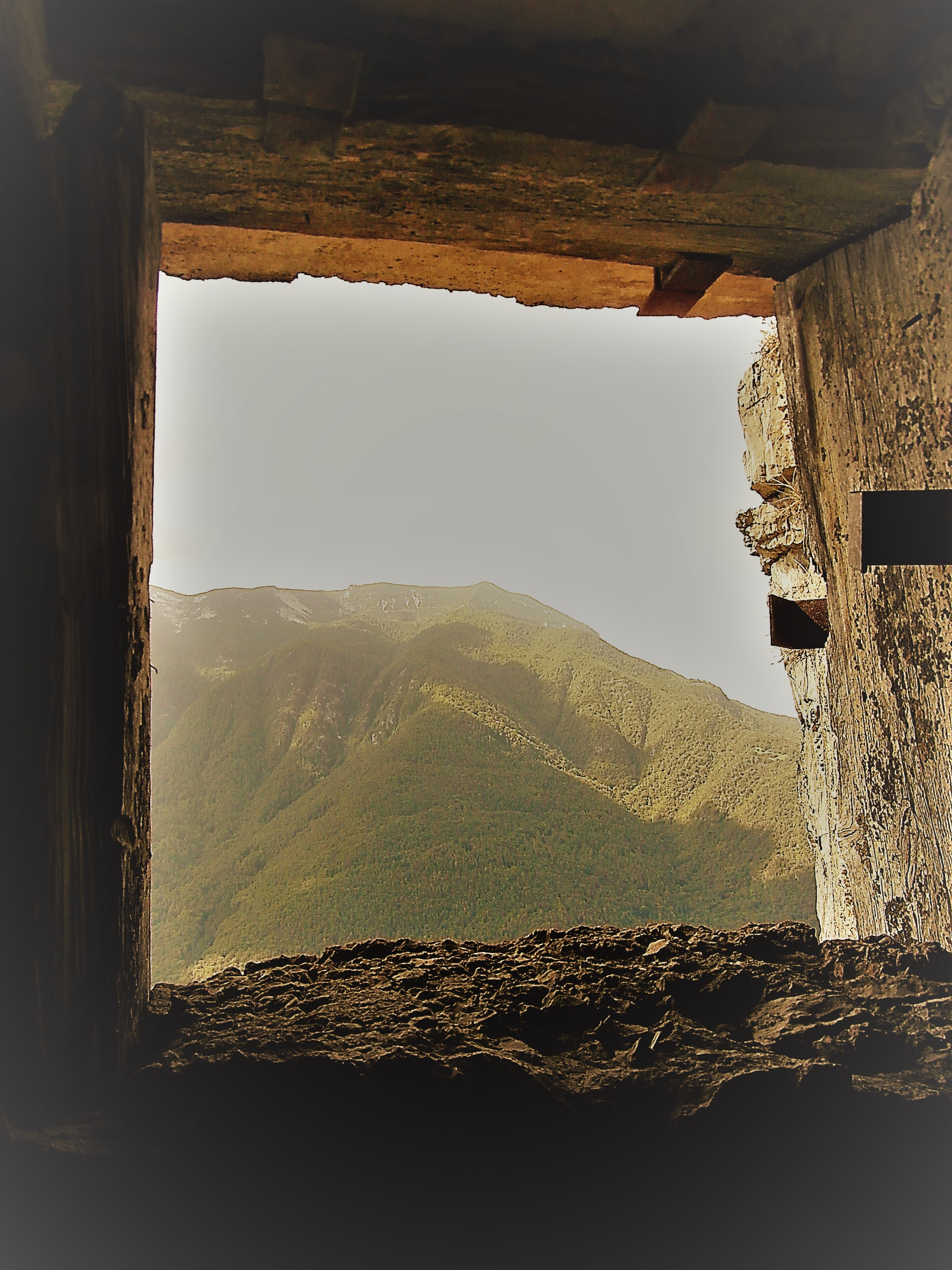 Forte Le Finestrelle